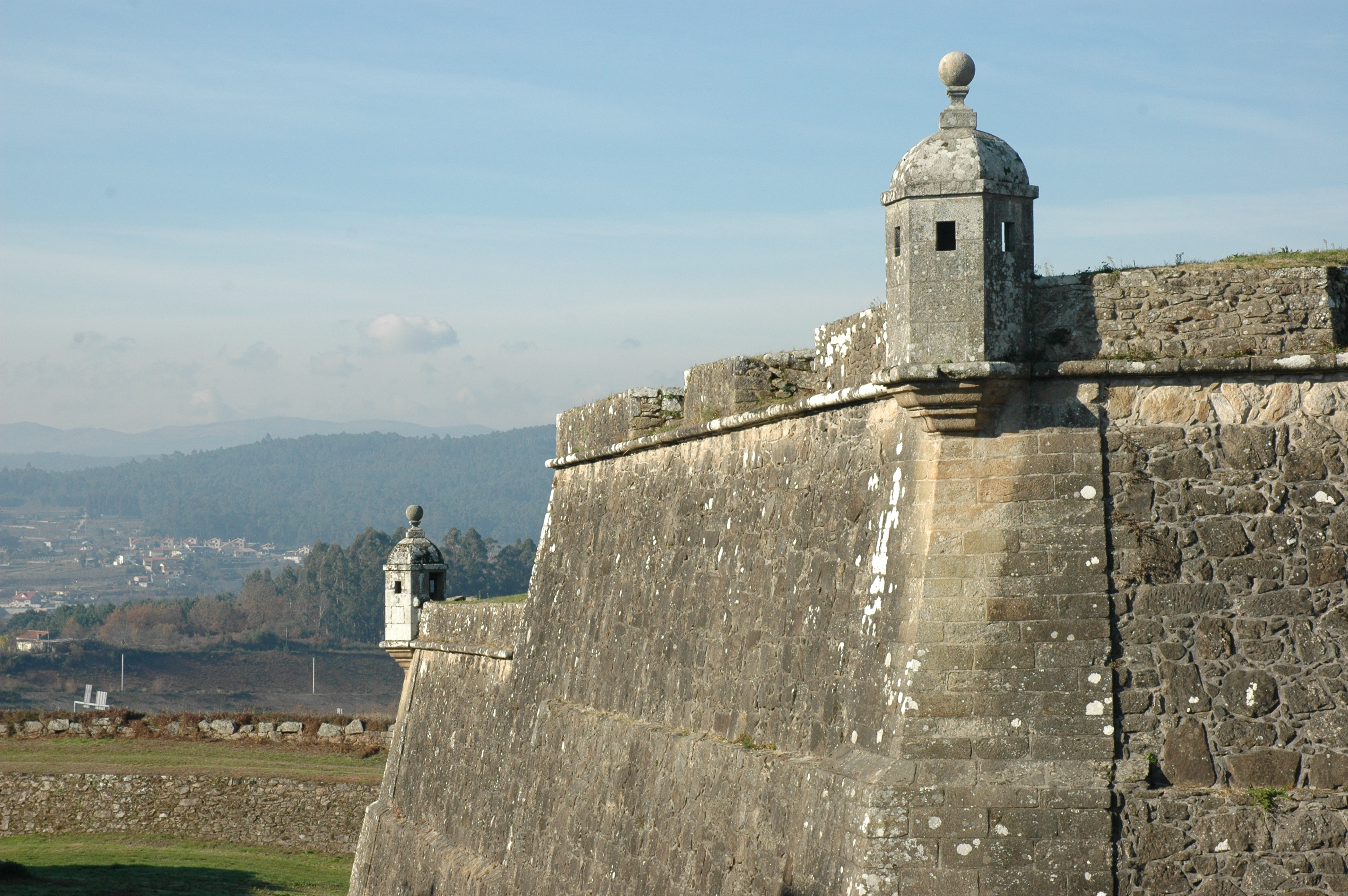 Valença do Minho - Castell